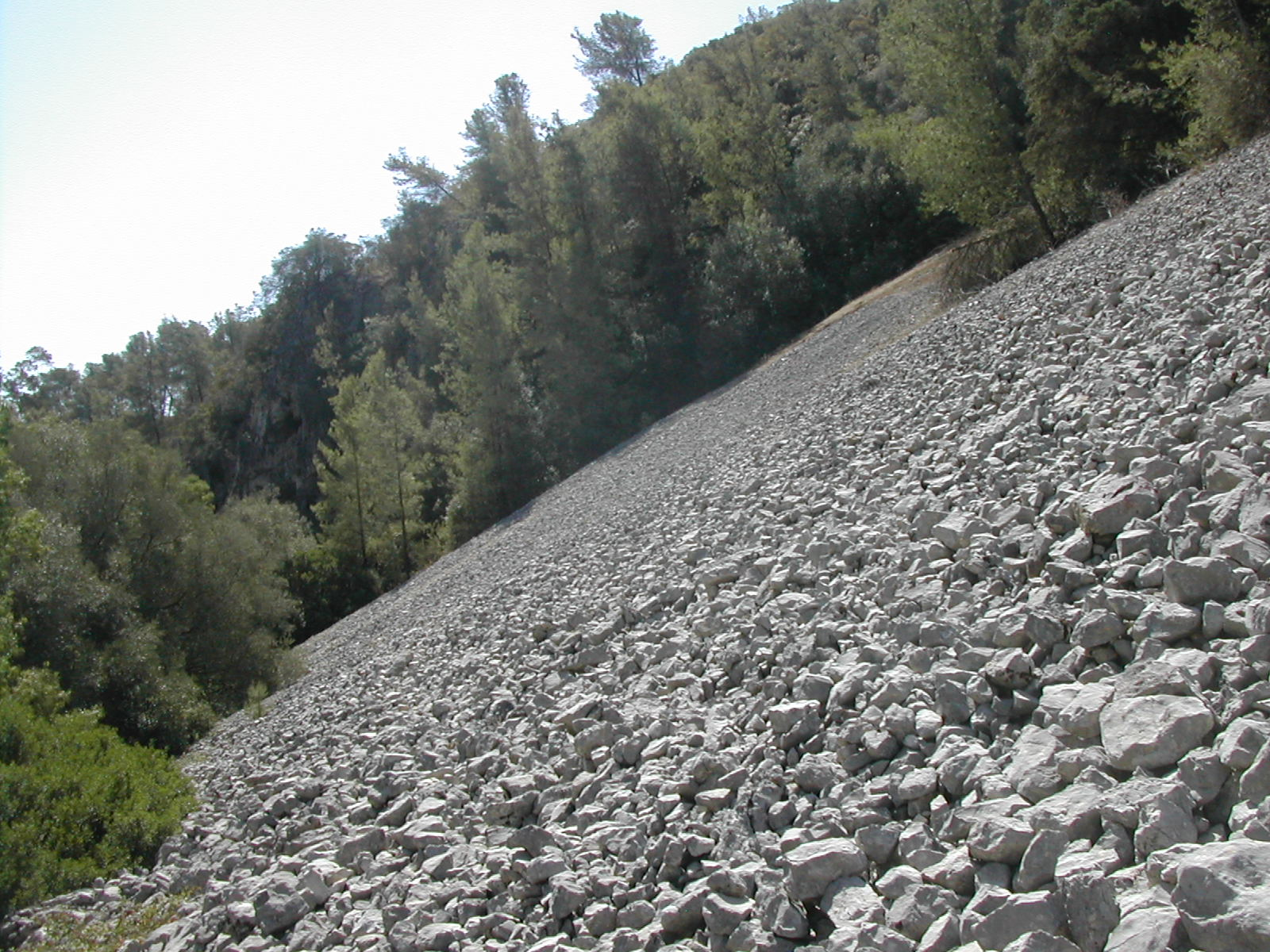 Cascalheira na parede direita do canhão da Ota, Ota, Alenquer